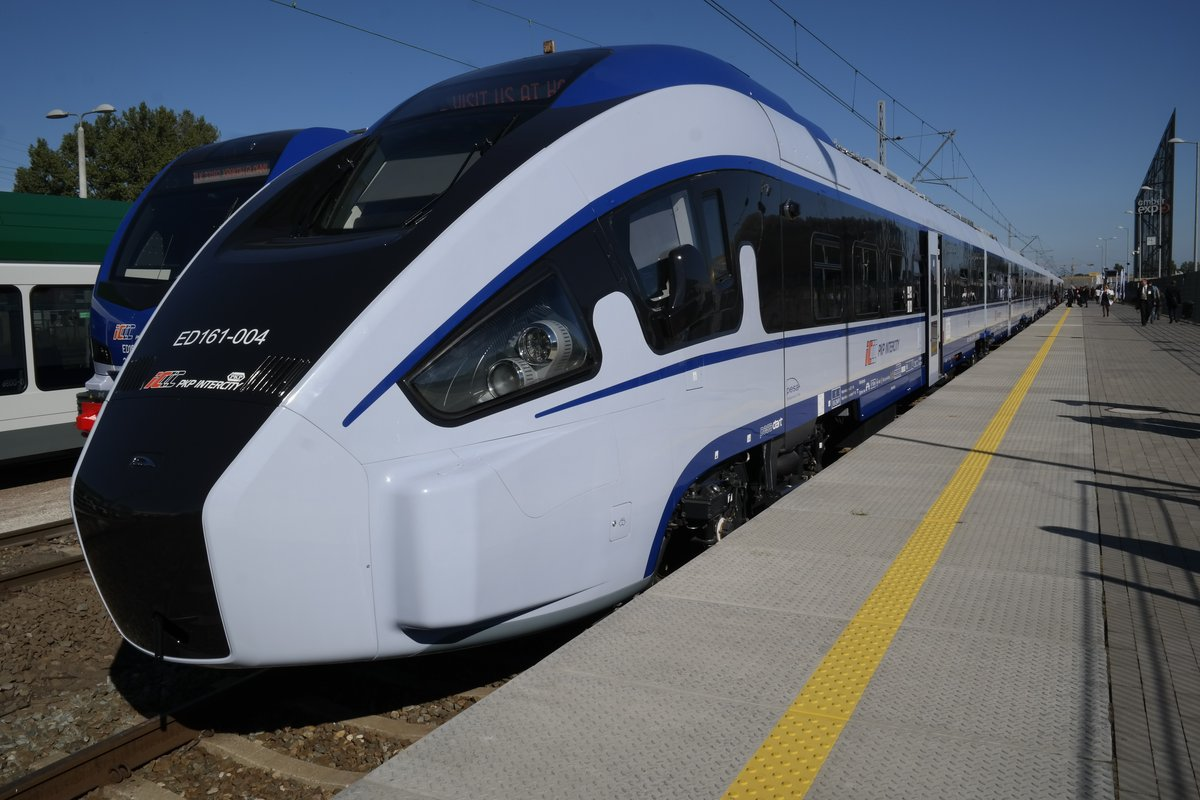 Zdjęcie zrobione podczas targów Trako 2015 This photo was taken during Railway Wikiexpedition 2015 set up by Wikimedia Polska Association in cooperation with Fundacja Grupy PKP. You can see all photographs in category Wikiekspedycja kolejowa 2015.